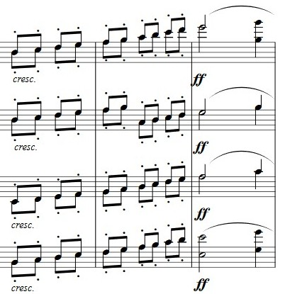 Beispiel für einen aszendenten Melodieverlauf aus der Sinfonie Nr. 3 "Eroica" von Ludwig van Beethoven. Spannungsaufbau hier mittels eines crescendo hin zum fortissimo